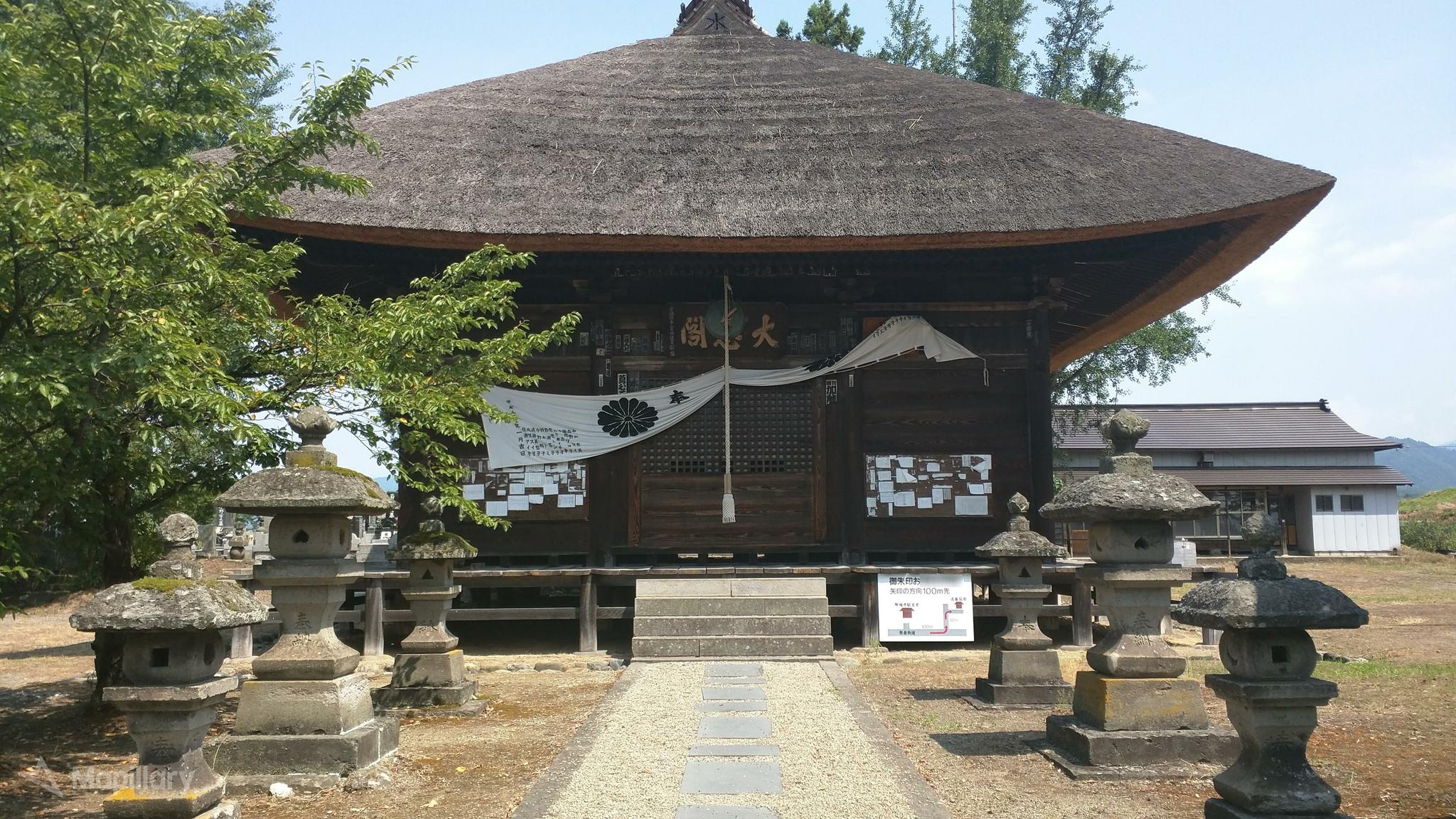 会津三十三観音 第6番札所 松島山勝福寺 勝観音堂